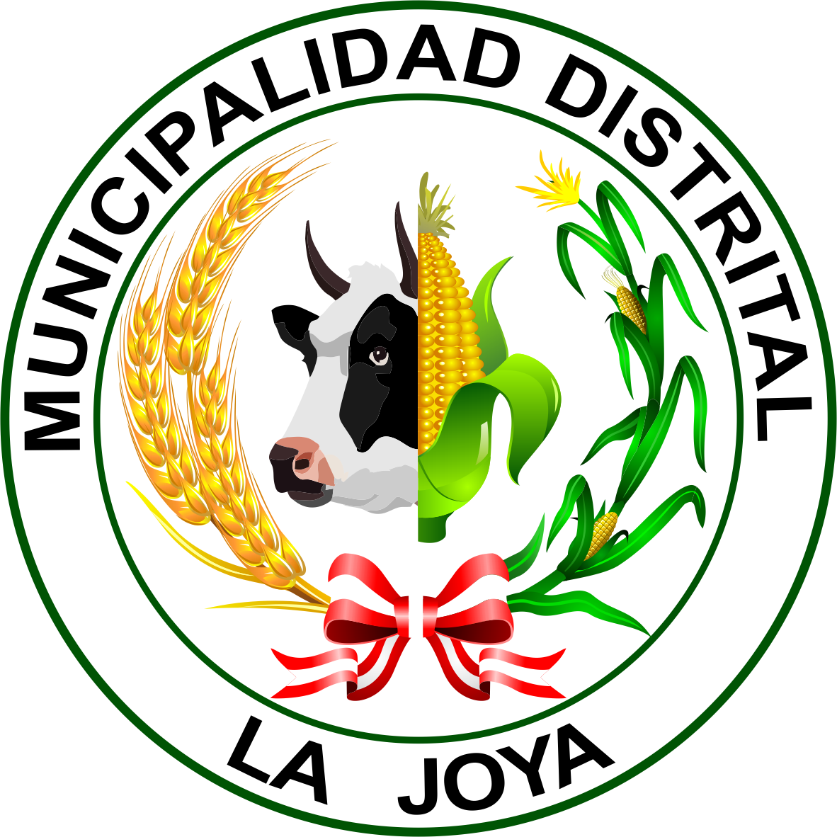 Distrito de La Joya - Provincia de Arequipa - Región Arequipa